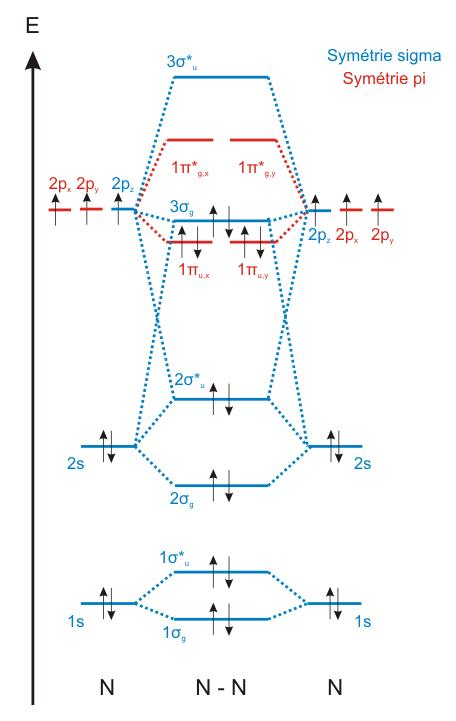 Diagramme d'OM du diazote